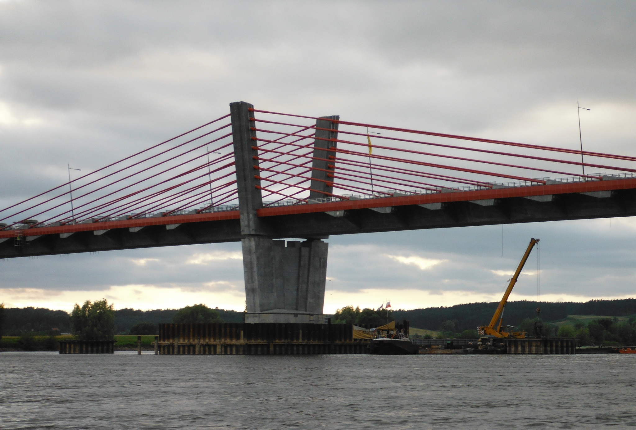 Most na Wiśle w ciągu drogi krajowej nr 90 (pod Kwidzynem).